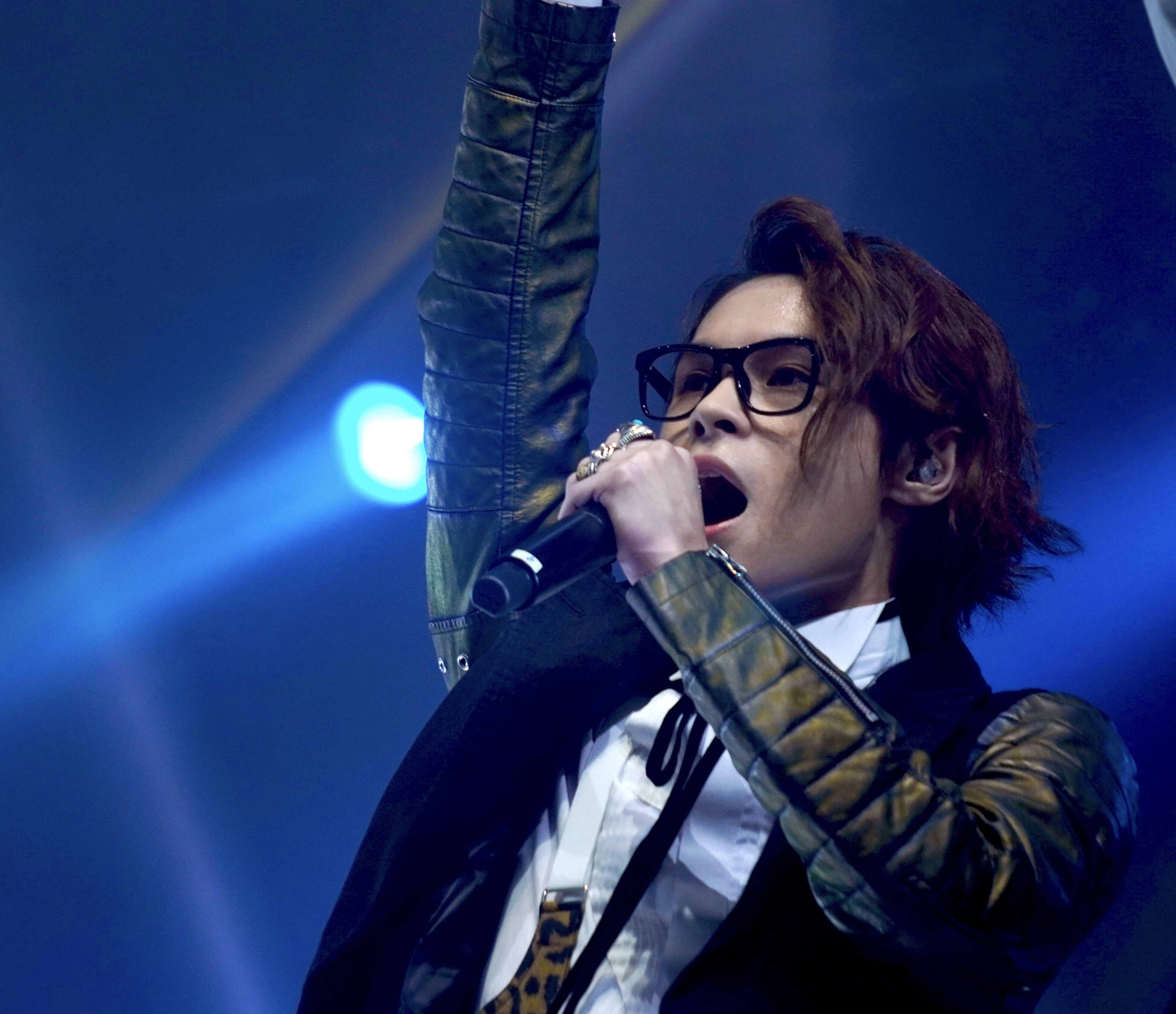 中文（香港）: 吳業坤小句號2019